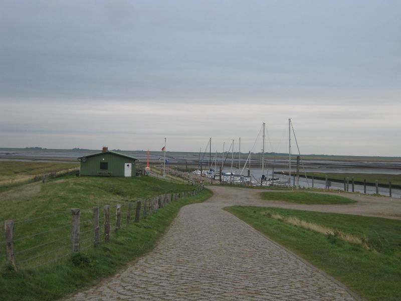 Hafen am Tümlauer Koog, Nordfriesland